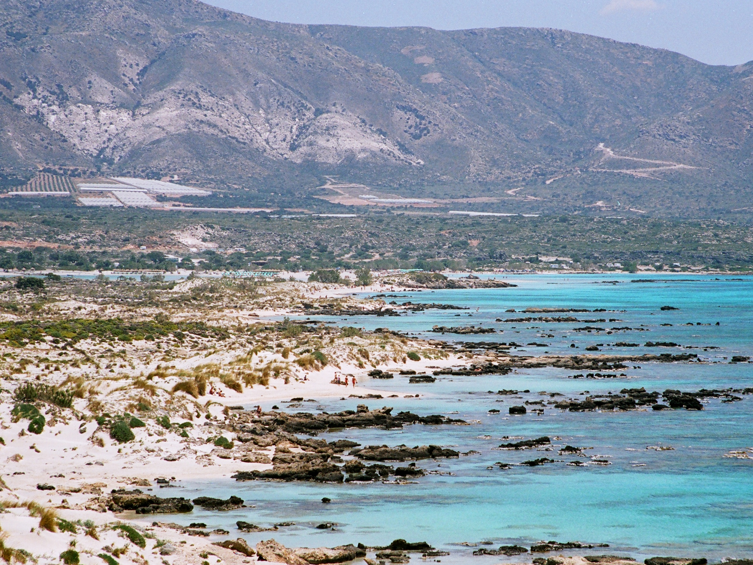 Insel Elafonisi, Südostküste, Kreta (Griechenland)